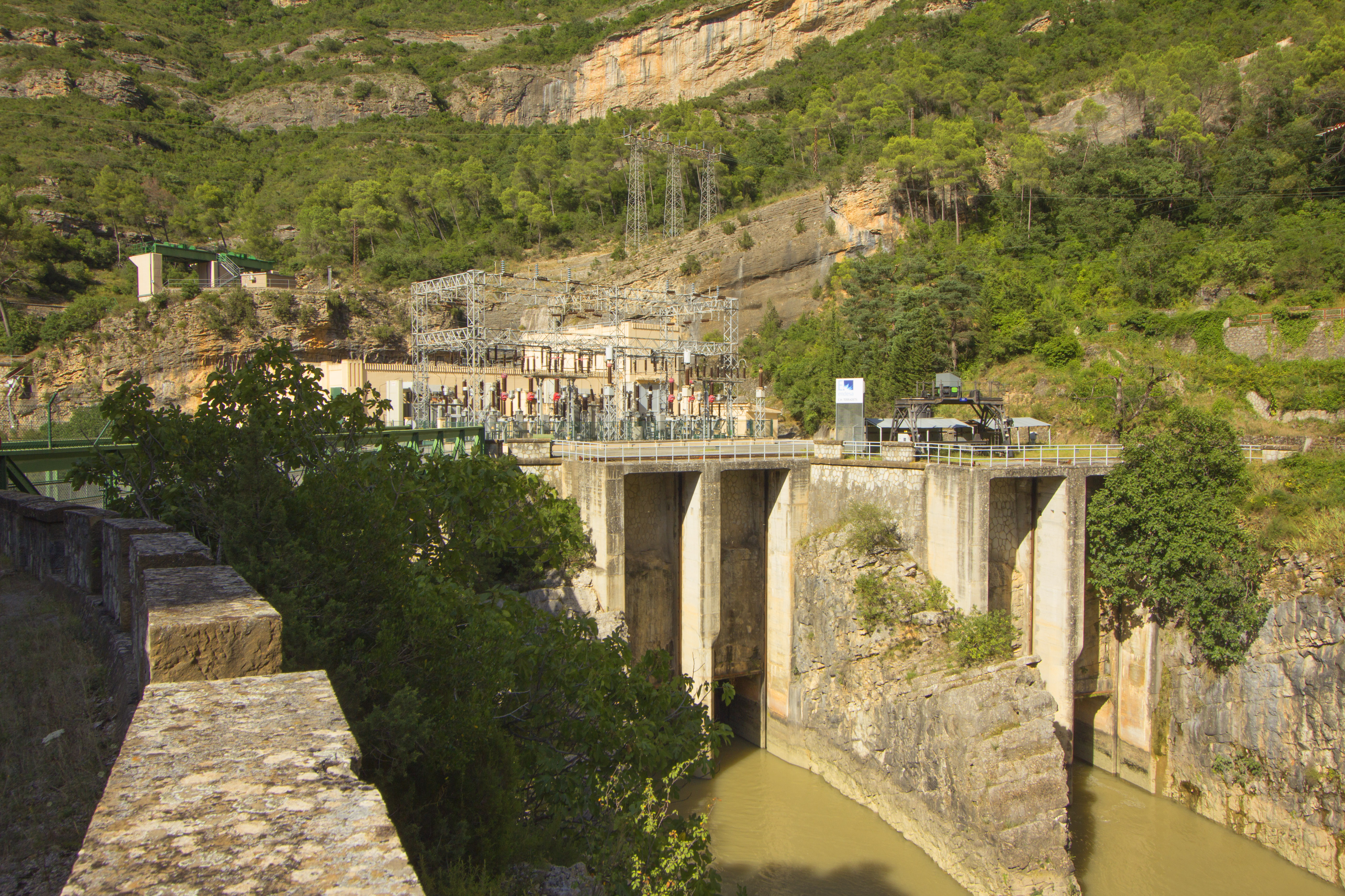 Transformadors de la central hidroelèctrica de Terradets (Pallars Jussà)